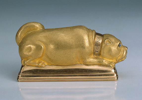 Табакерка в форме мопса